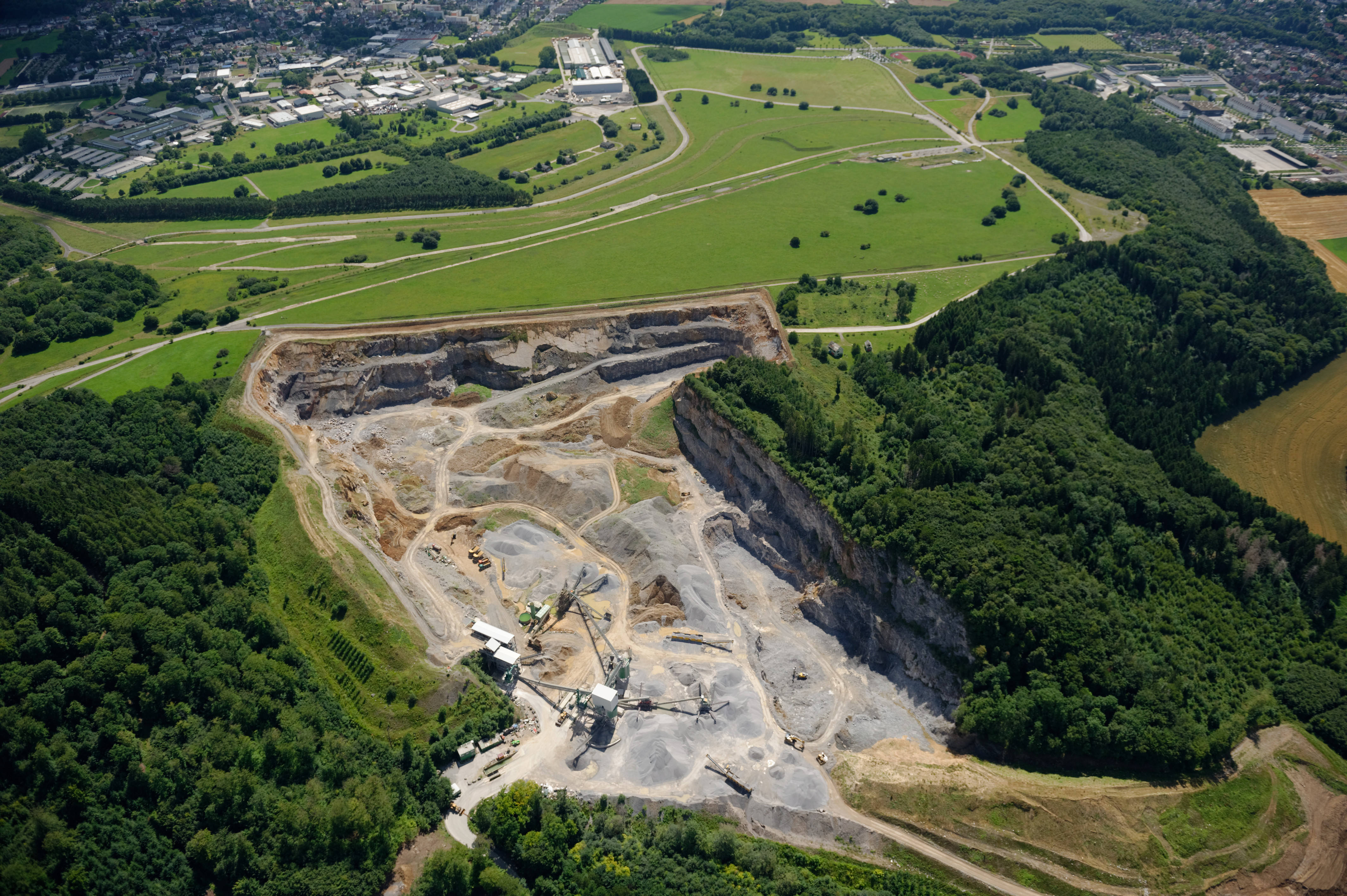 Luftaufnahme: Steinbruch Hemer-Becke, dann Naturerlebnisgebiet Hemer-Apricke der NRW-Stiftung mit ehemaligen Panzerstraßen des Standorttruppenübungsplatzes, links Deilinghofen und rechts Hemer,, Nordrhein-Westfalen